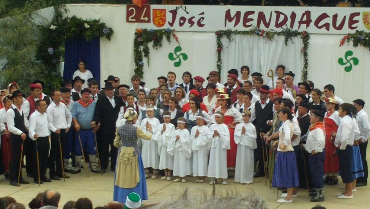 Jose Mendiague pastoralaren bigarren emanaldia. 2012-VIII-12. Arrokiaga